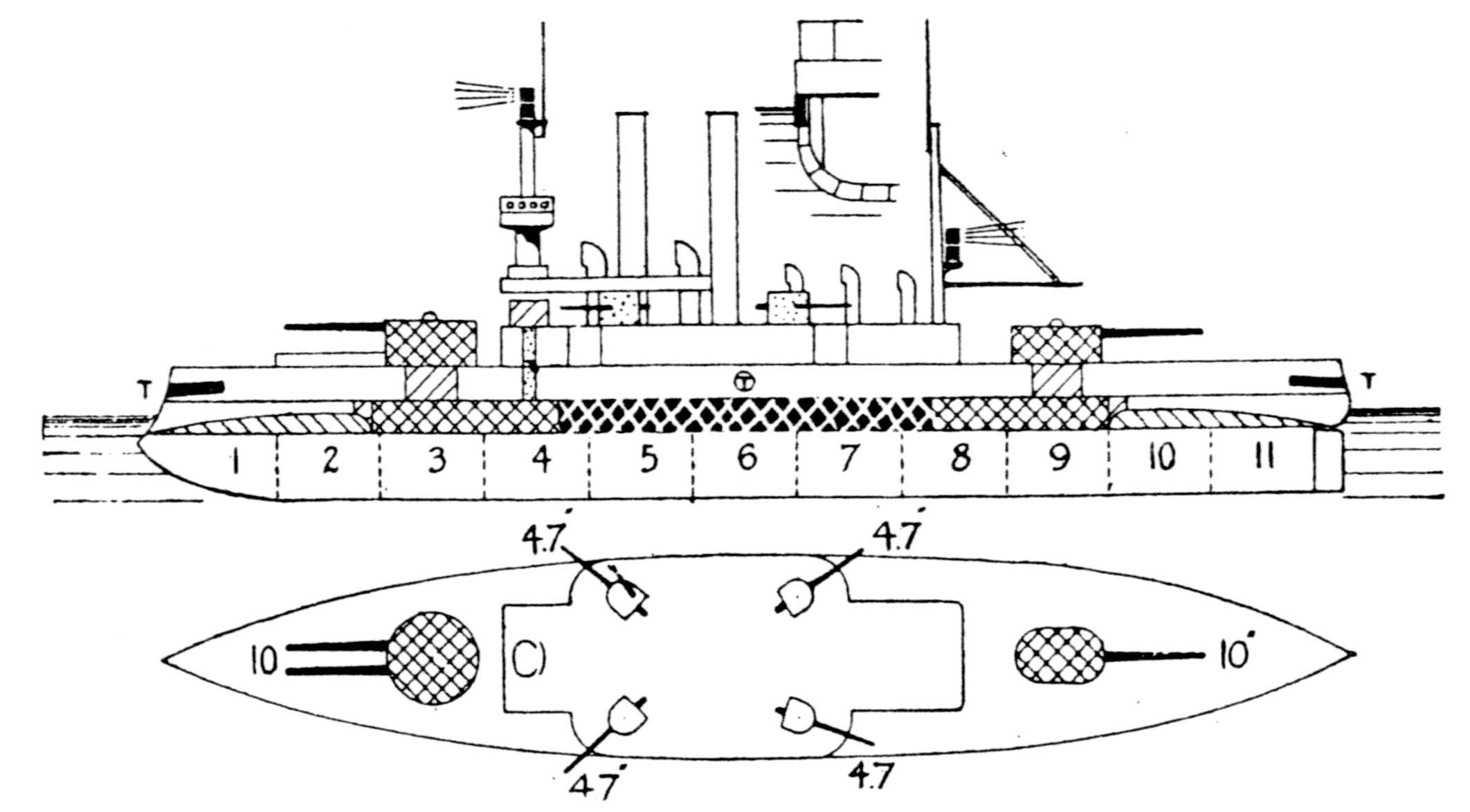 ロシアの海防艦「ゲネラル・アドミラル・アプラクシン」、日本の海防艦「沖島」